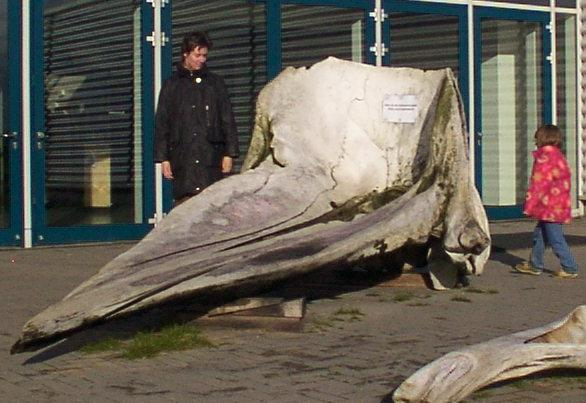 Schädel (Oberkiefer) eines Pottwals